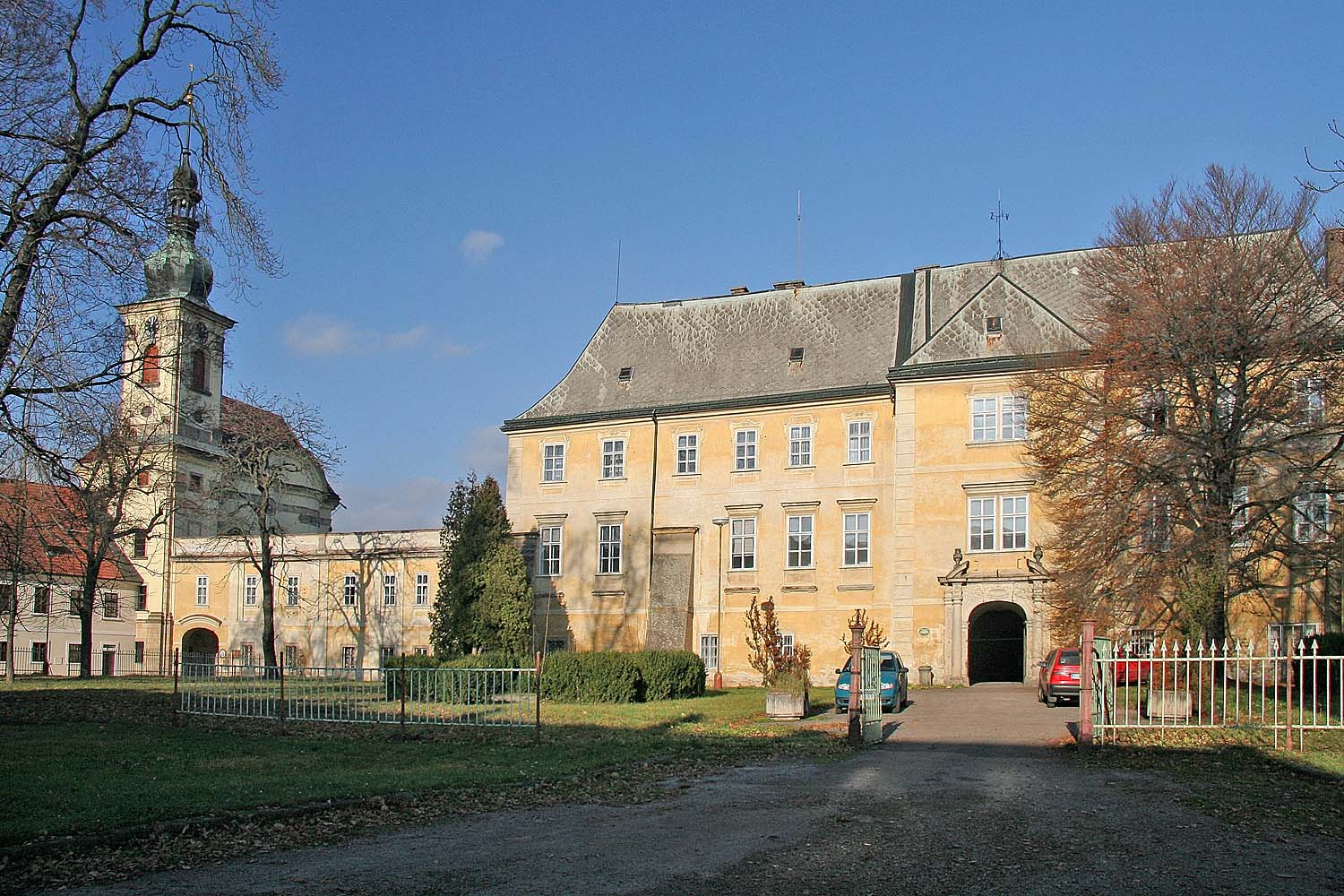 Zámek ve Smiřicích, district Hradec Králové autor: Prazak date: 30. 11. 2006